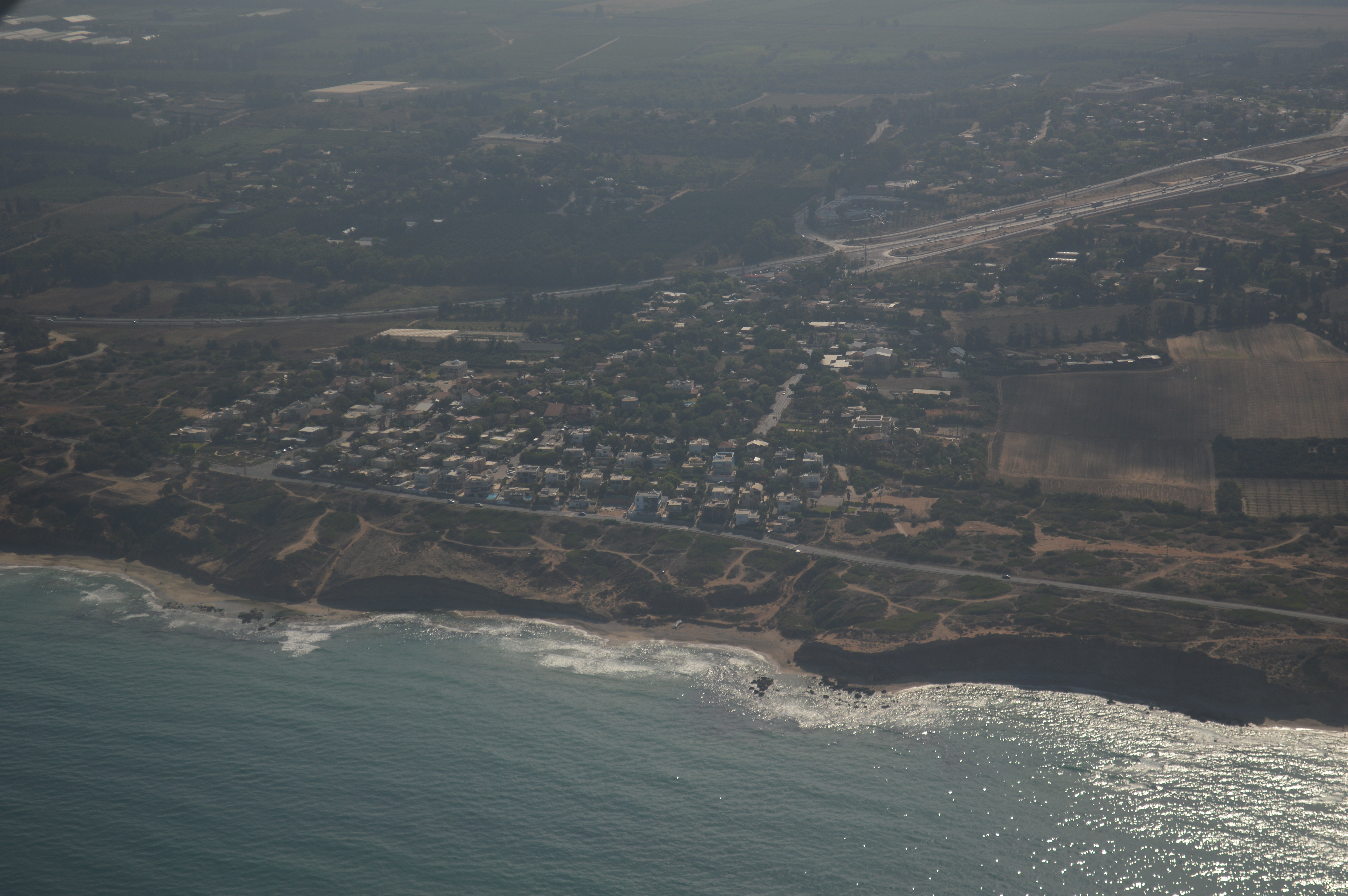 צילום אוויר של צוקי ים וחבצלת השרון